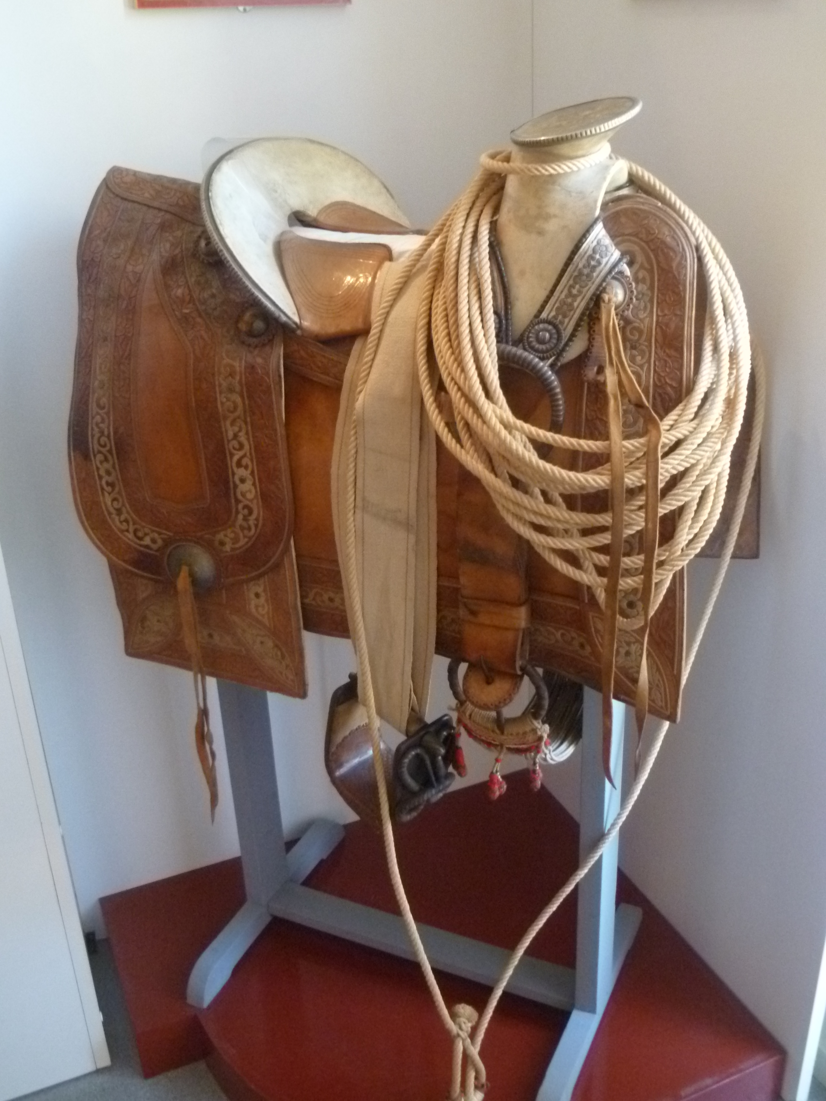 Selle de charro'; lasso (fibre végétale) (Mexique, 19e siècle)', Musée de la Vallée, Barcelonnette, France